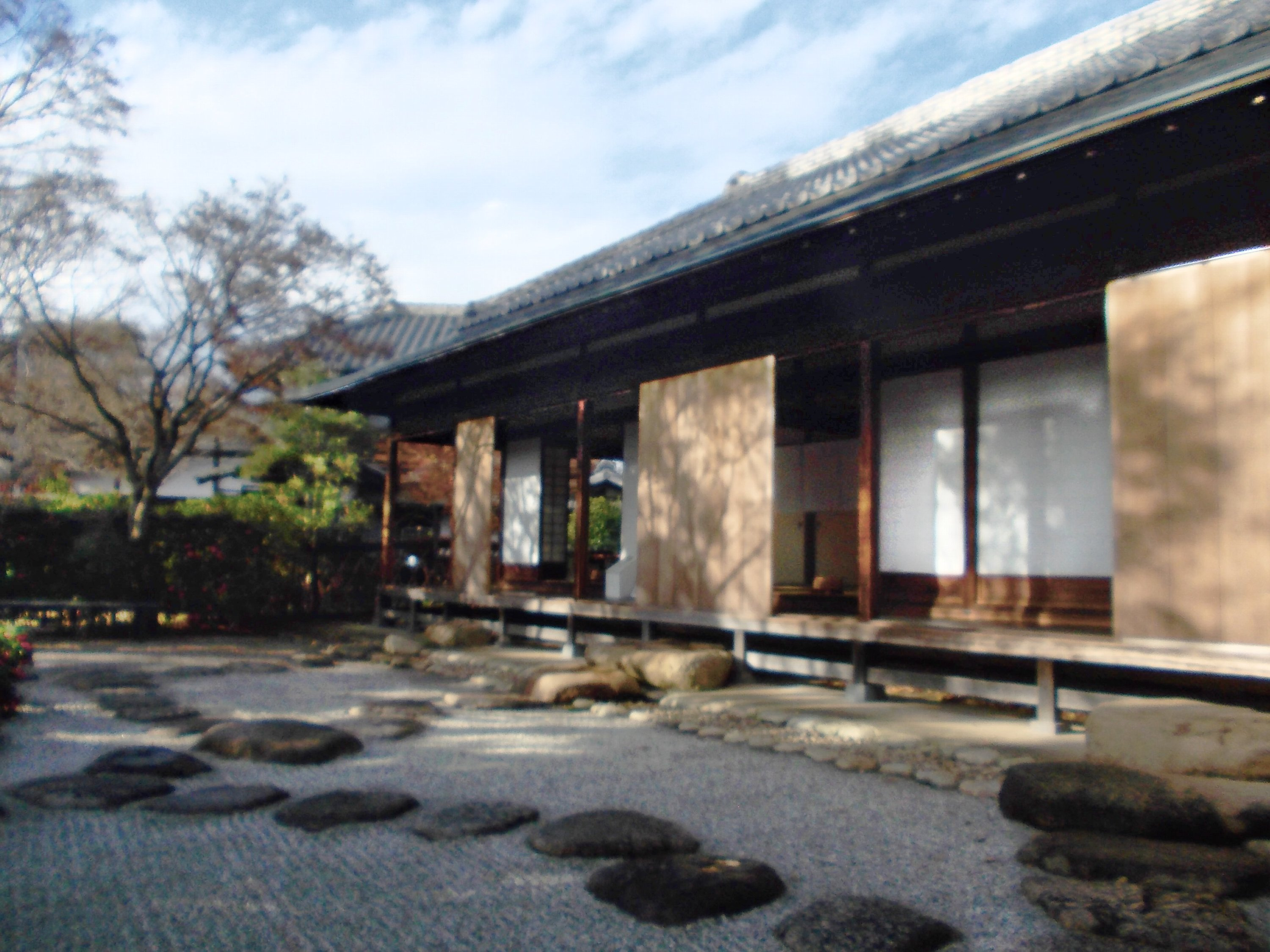 一茶双樹記念館・秋元邸（千葉県流山市）